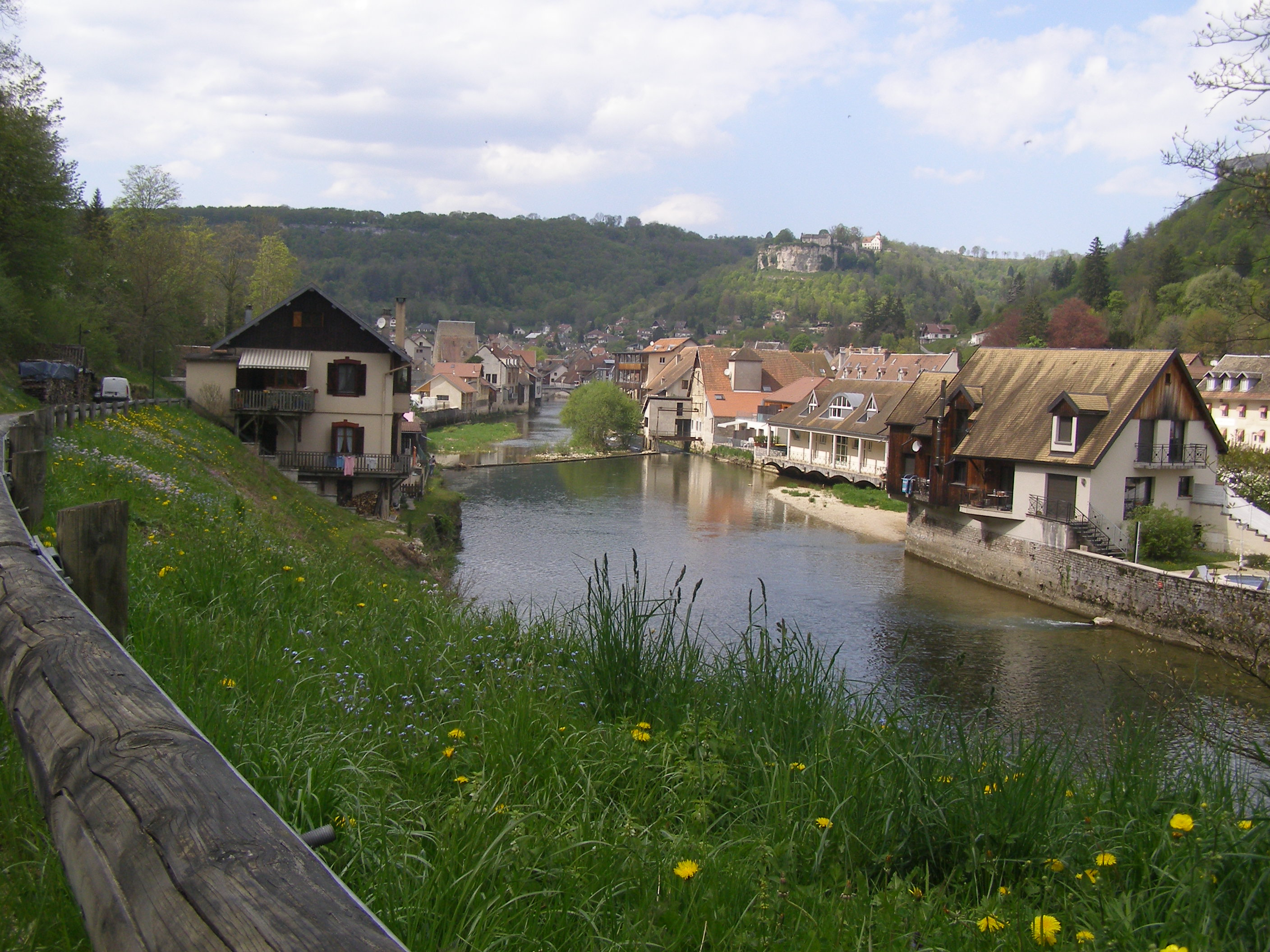 Les deux rives de la Loue à Ornans